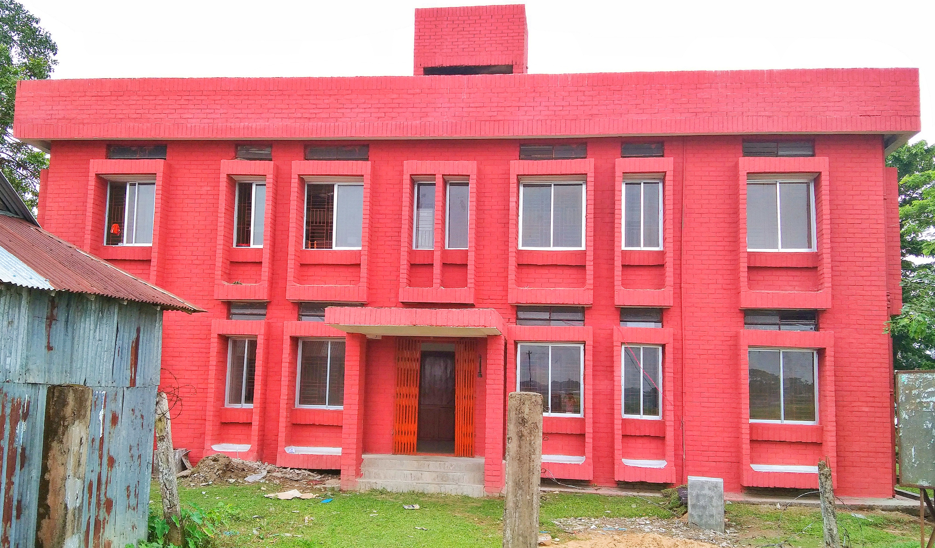 সোনাজুর, আটপাড়া, নেত্রকোণা